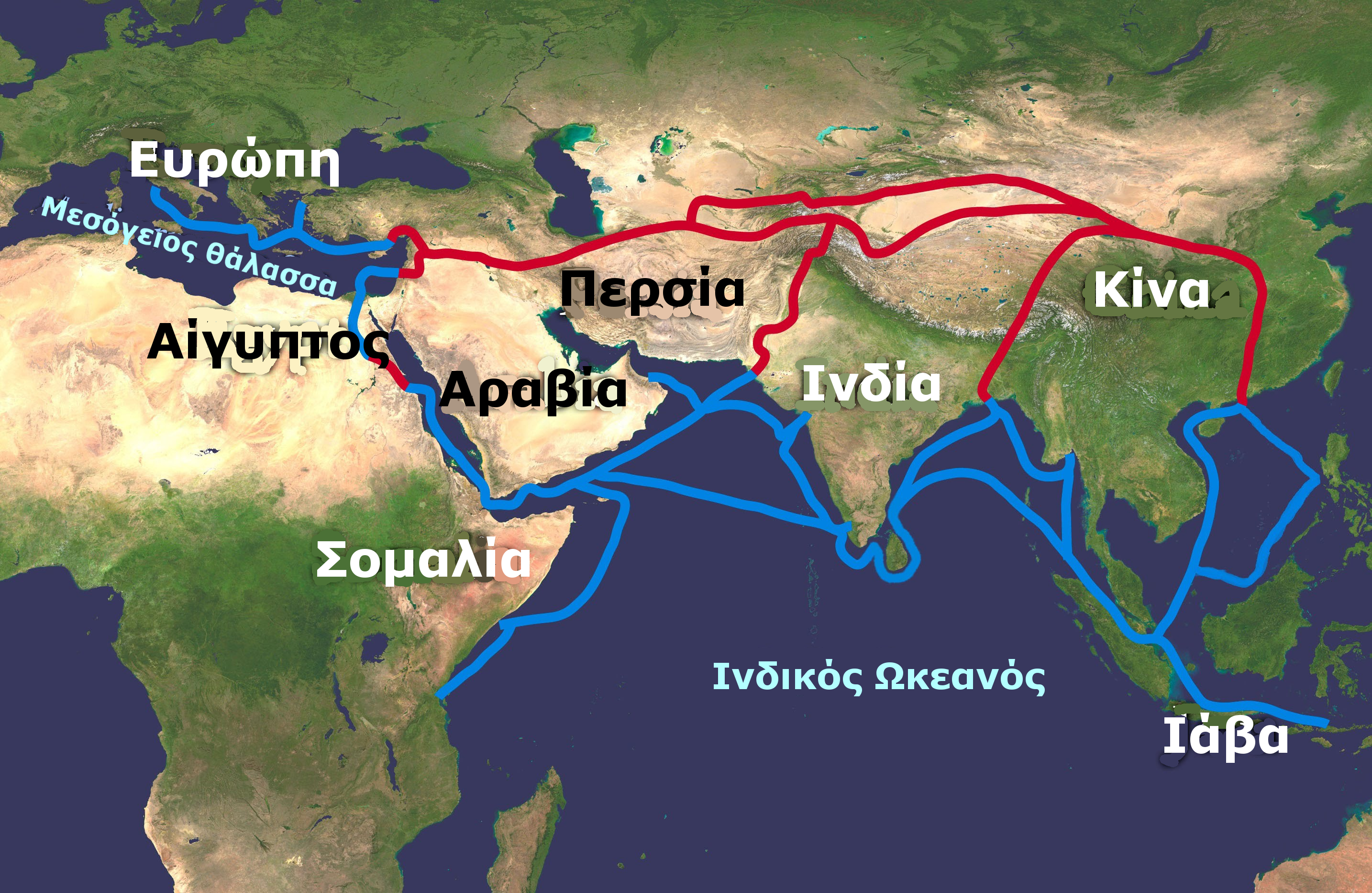 Ο δρόμος του μεταξιού.